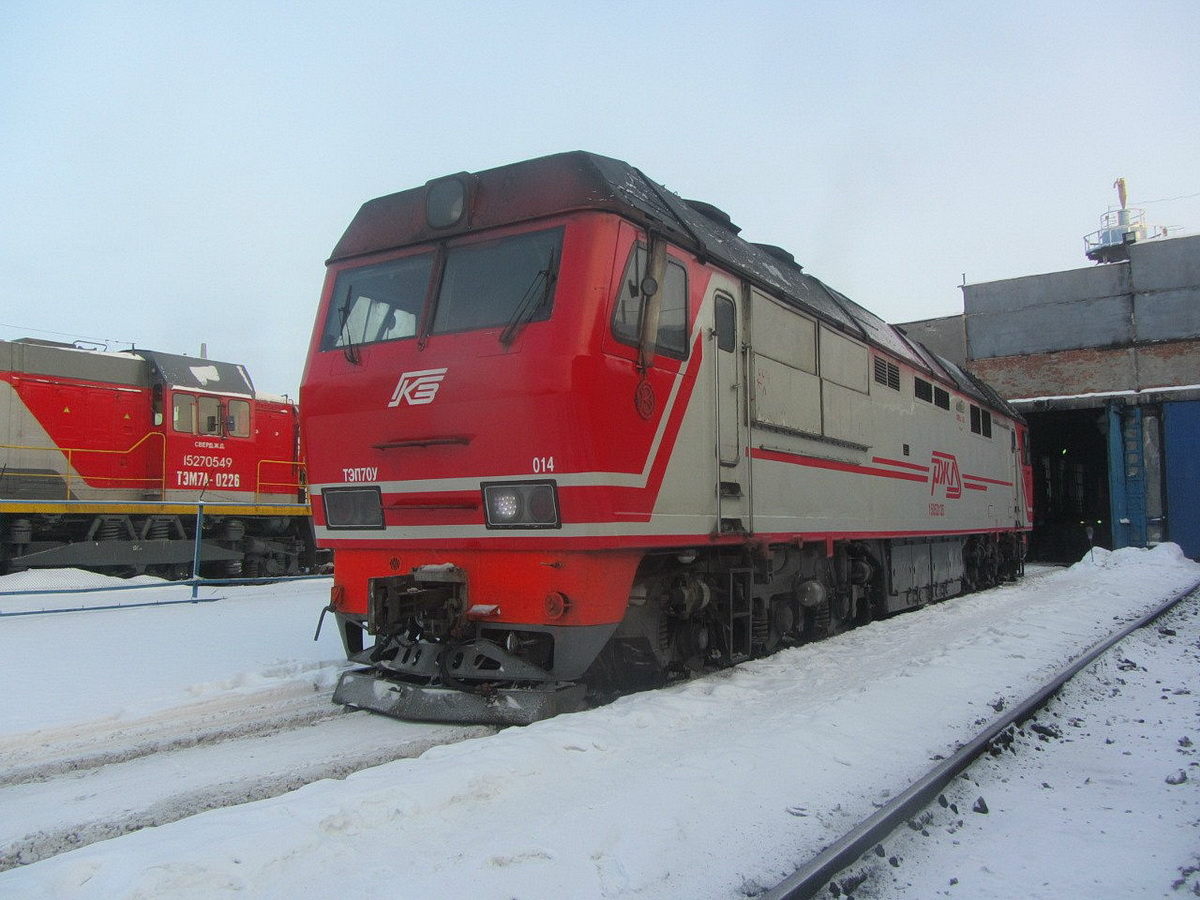 Тепловоз ТЭП70У-014 Россия, Ханты-Мансийский автономный округ, депо Сургут